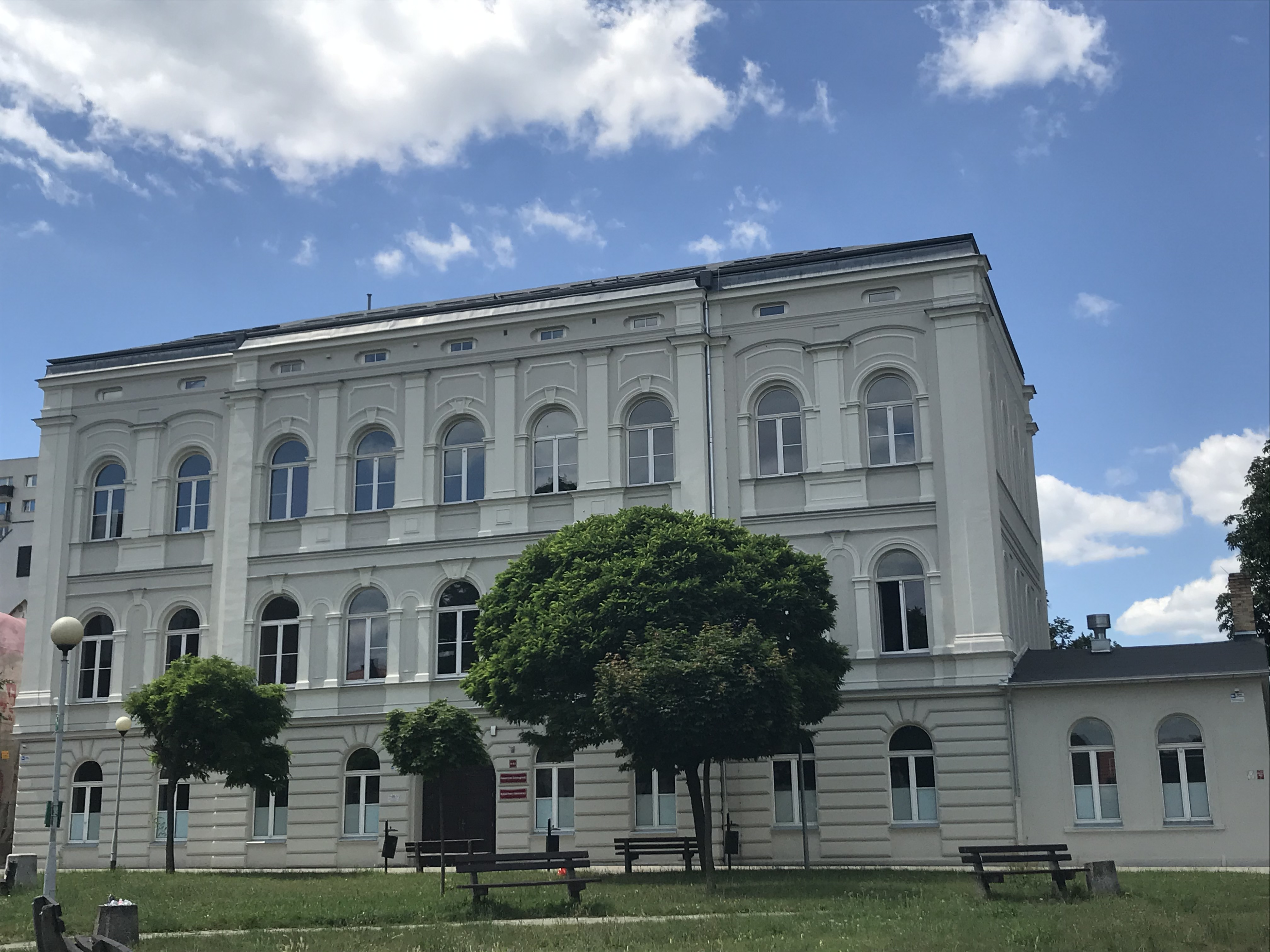 Wydział Prawa i Administracji UZ